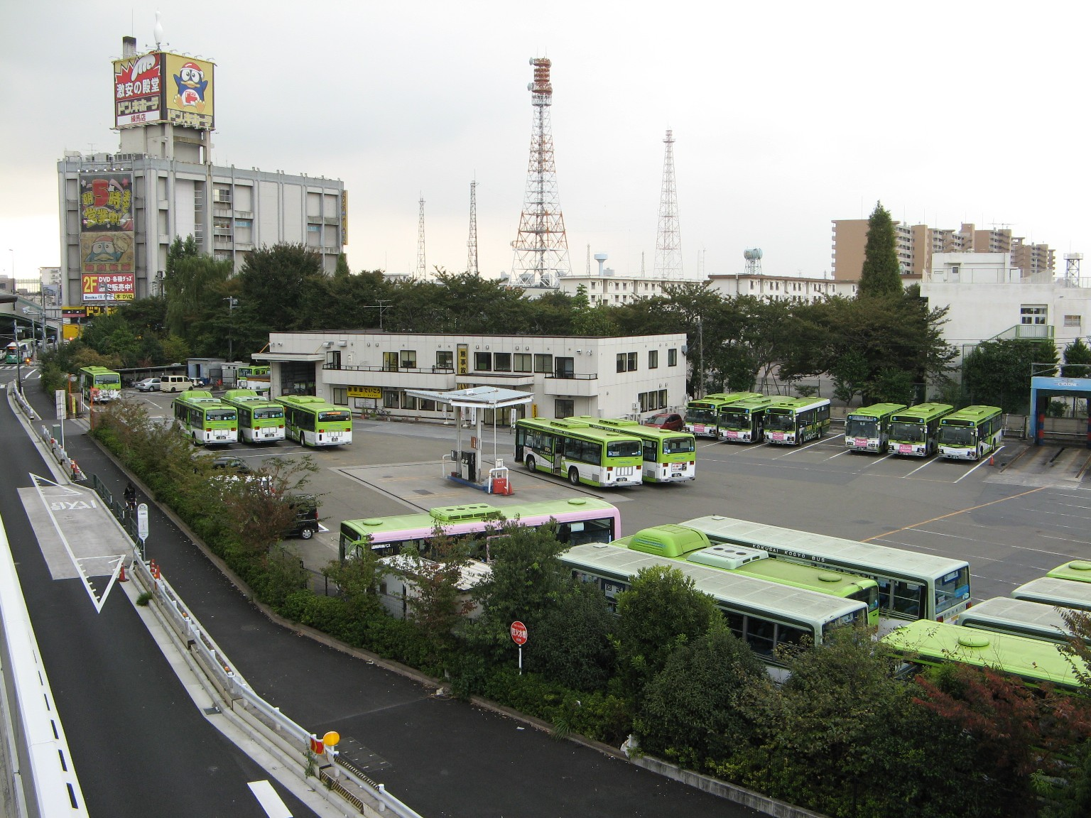 国際興業練馬営業所。敷地そばの歩道橋上より撮影。